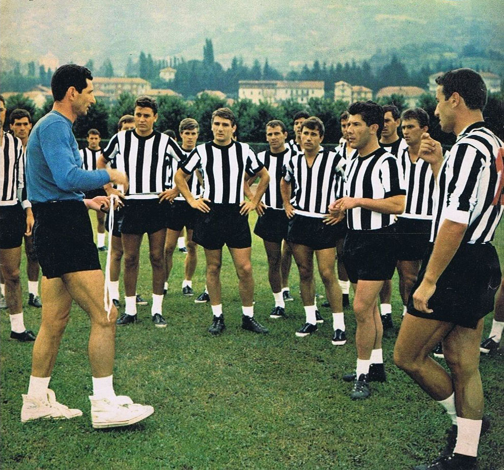 Villar Perosa, estate 1964. La Juventus della stagione 1964-65 in allenamento durante il precampionato; si riconoscono il tecnico Heriberto Herrera (a sinistra) e il capitano Omar Sívori (a destra).